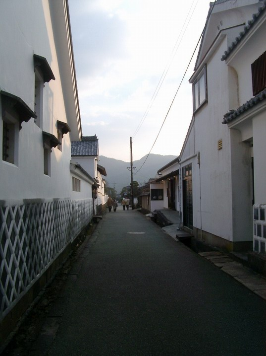 Kikuya Yokocho